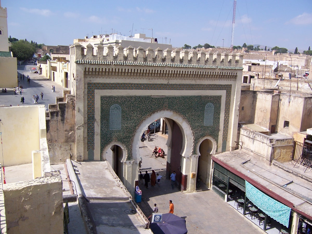 Fez, Morocco